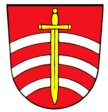 Wappen von Maisach, Landkreis Fürstenfeldbruck, Oberbayern